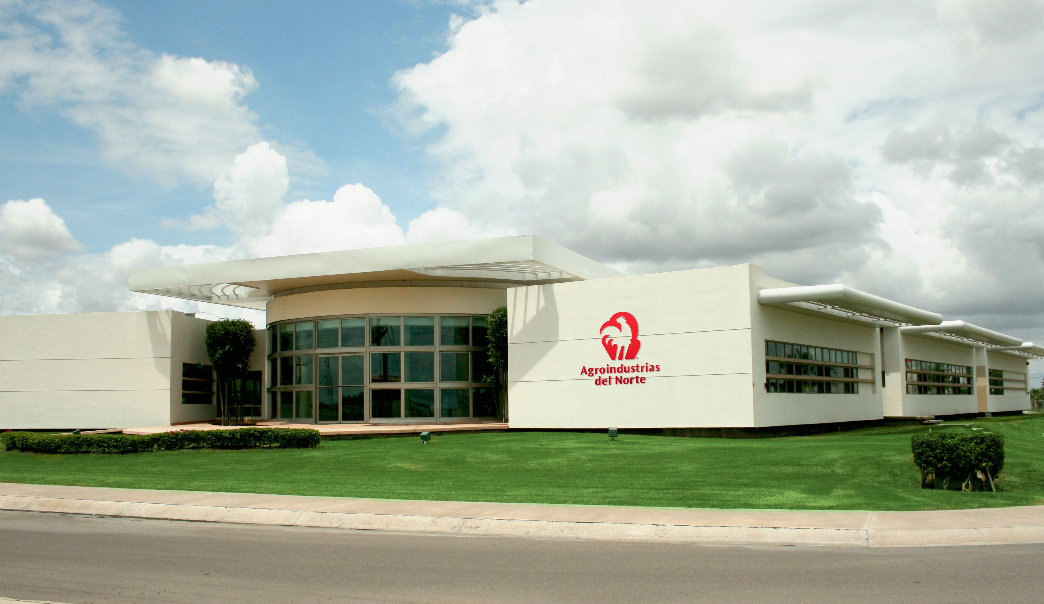 Fotografía tomada de frente al corporativo.